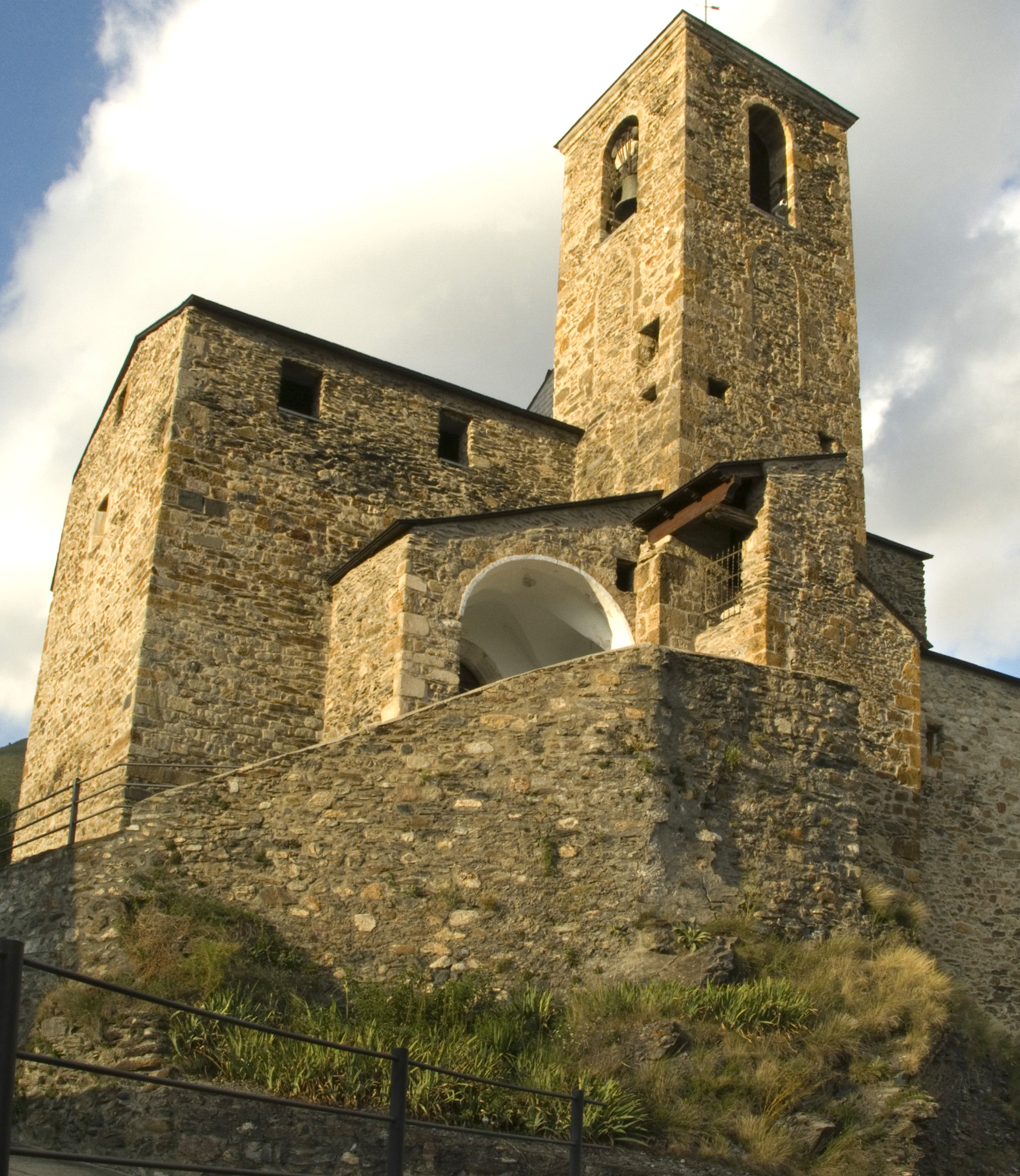 Poble de Castilló de Sos